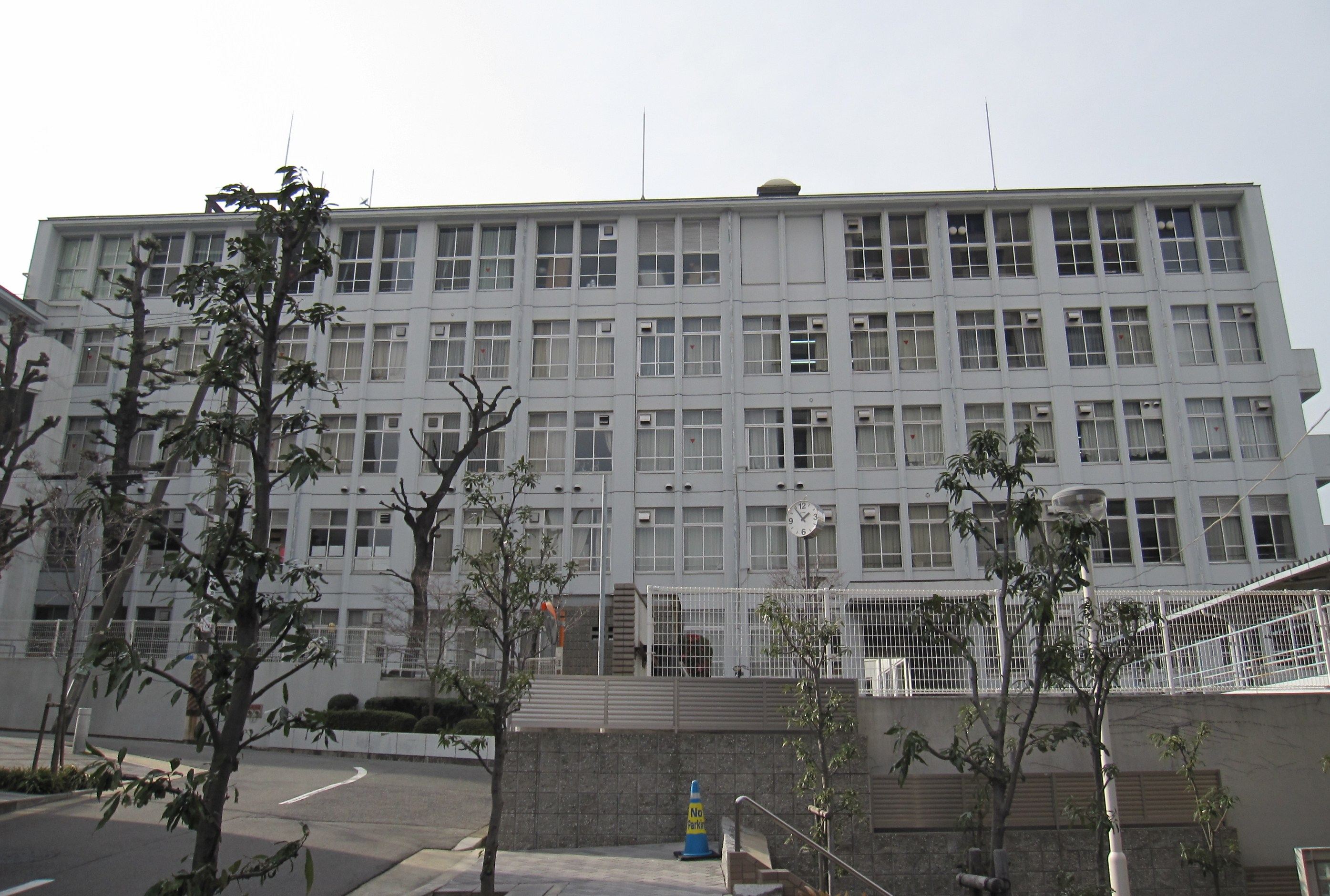 大阪府立清水谷高等学校 Canon IXY Digital 920 IS